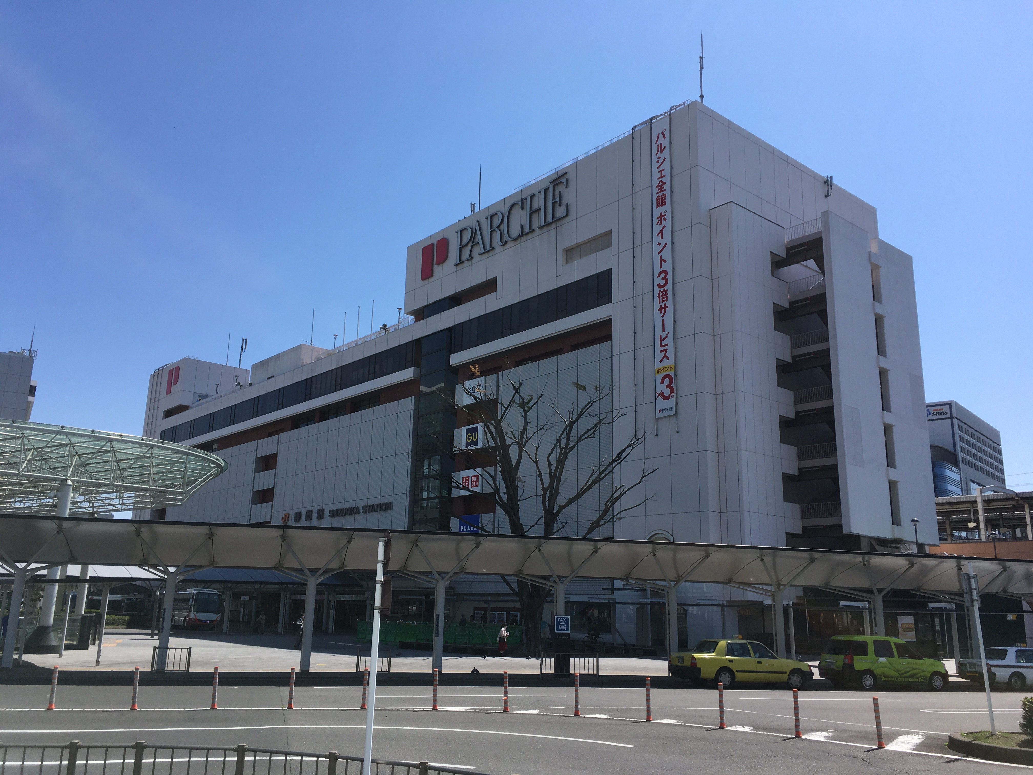 静岡駅ビル